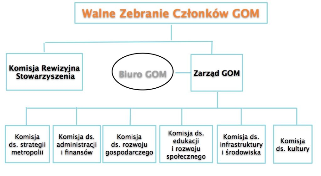 Model organizacyjny Gdańskiego Obszaru Metropolitalnego.